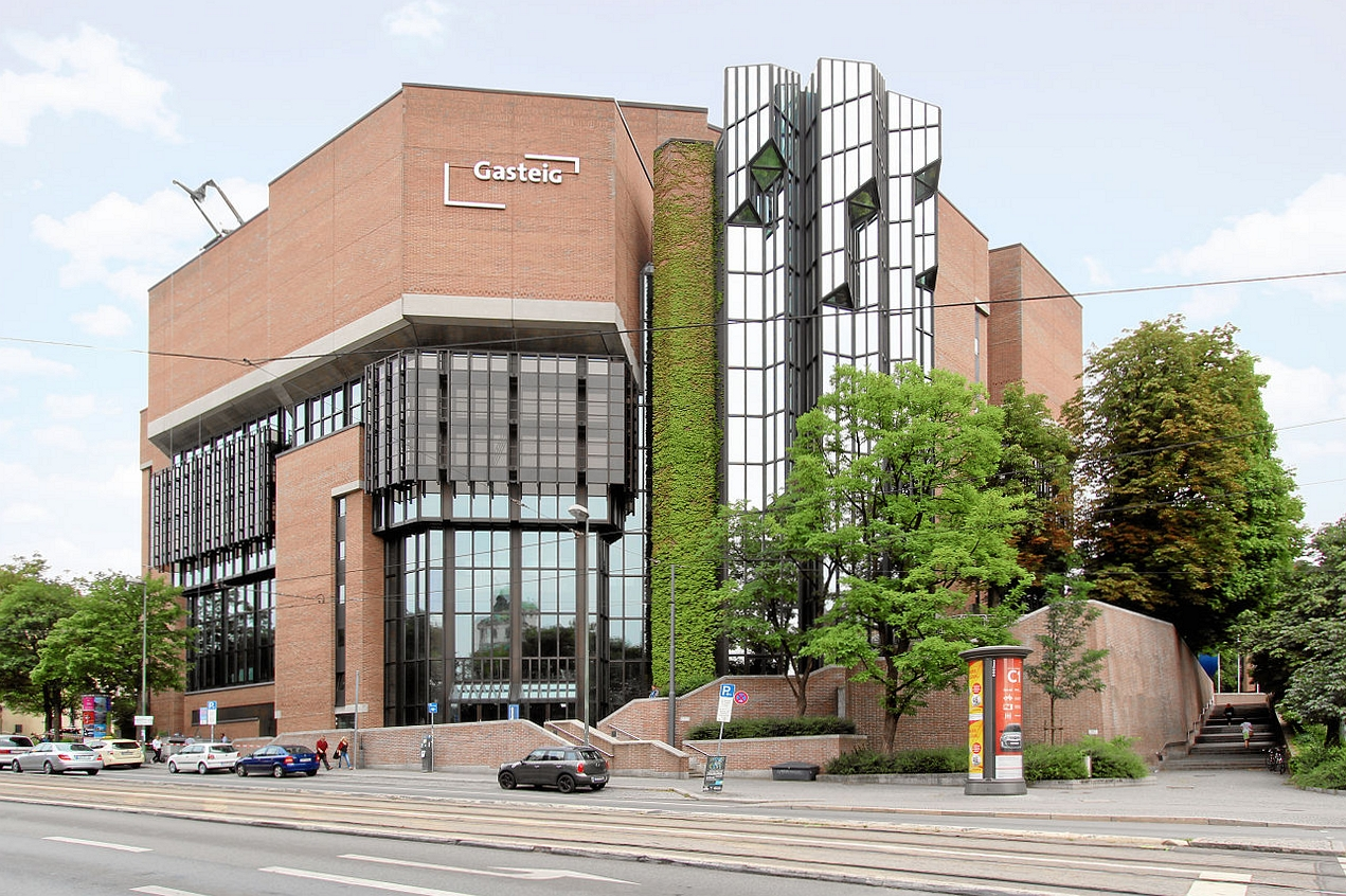 Gasteig am 29. Juli 2014